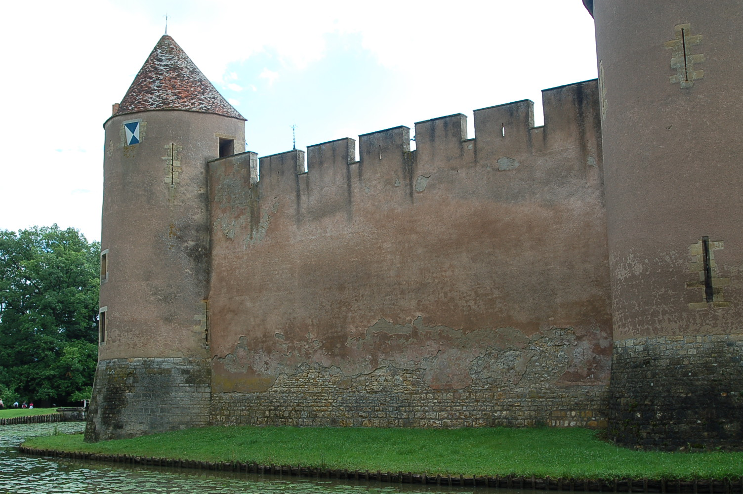 Vue d'une partie de l'enceinte médiévale du château d'Ainay-le-Vieil